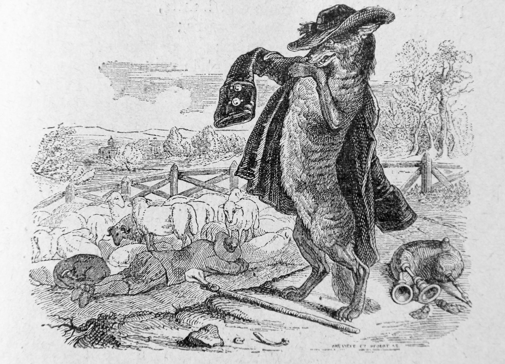 J.J. Grandville. Illustrations des Fables de La Fontaine. 1838-1840.